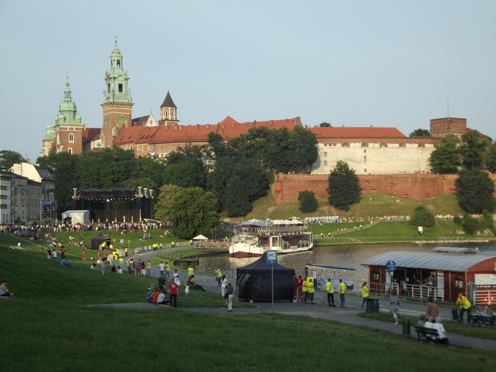 Święto „Wianki” w Krakowie.